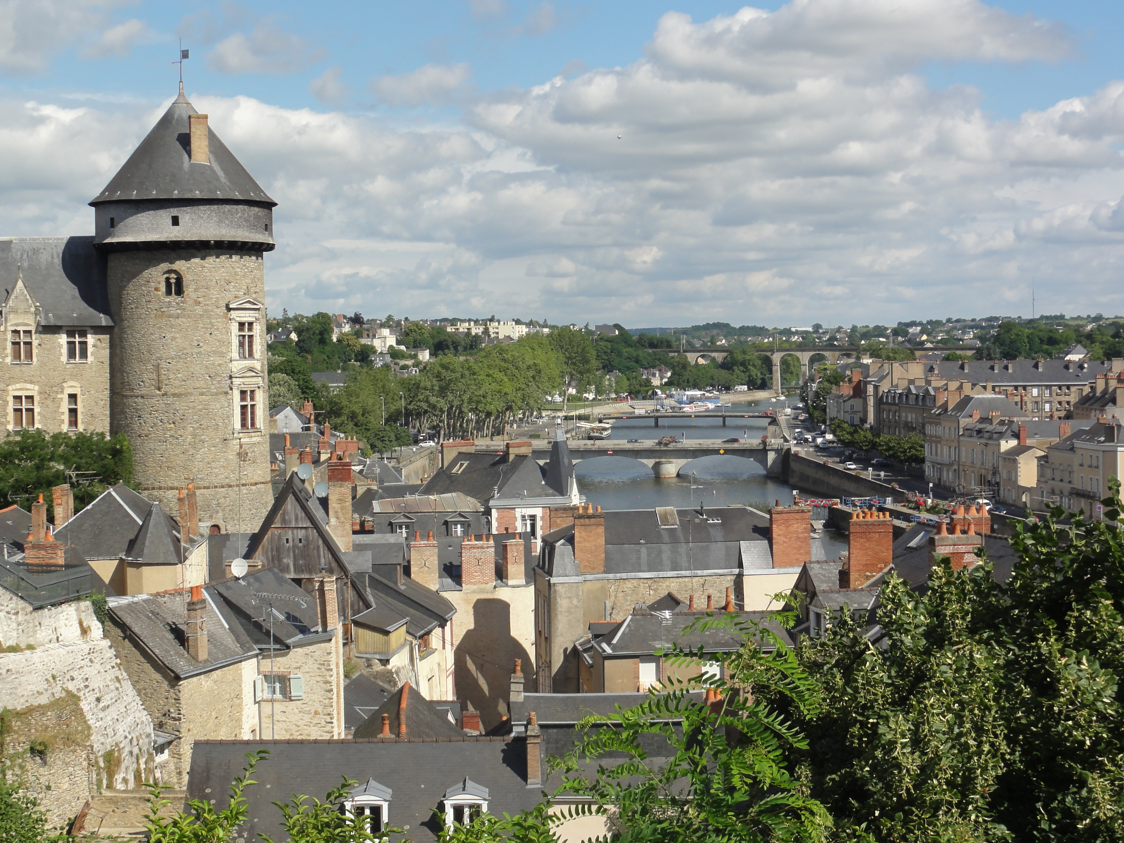 2013-08-12 Laval - Le vieux chateau - France 05.JPG